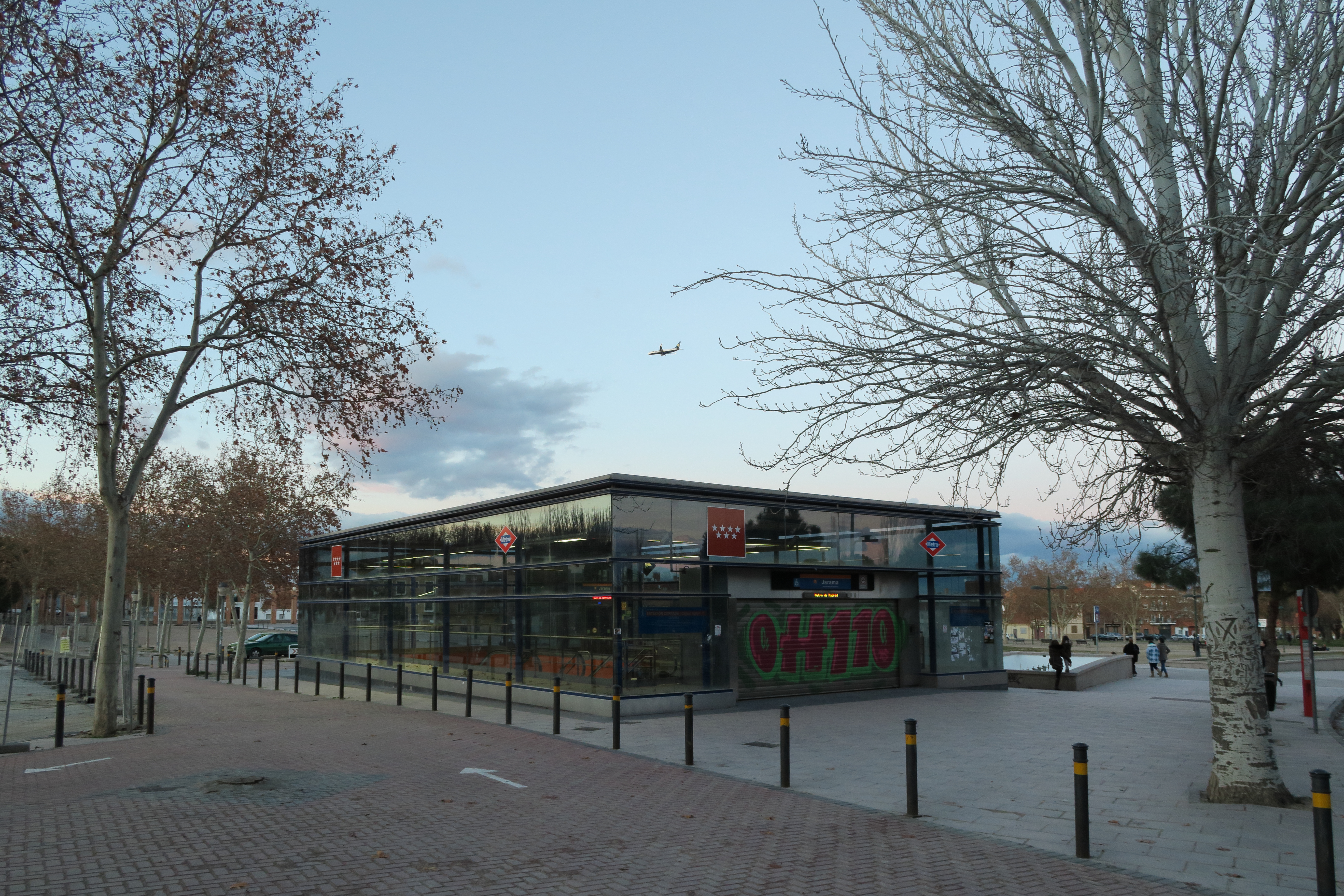 Estación de Jarama